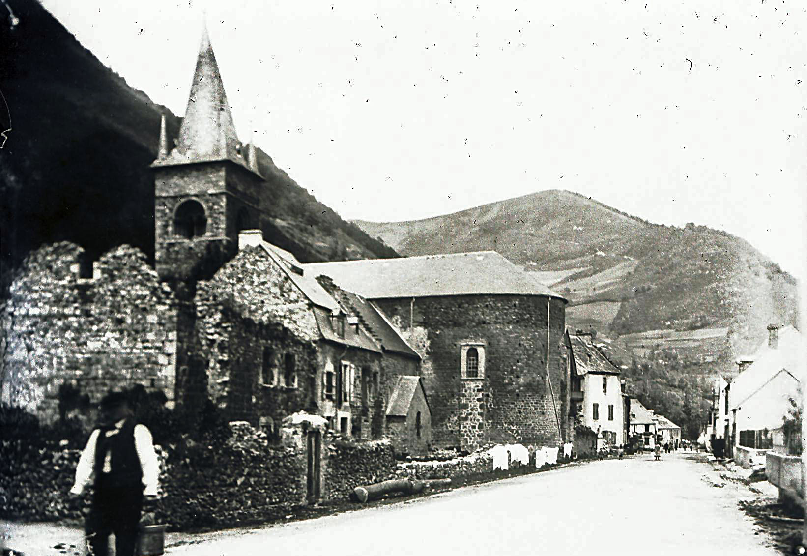 Église de Sarrancolin au tout début du XXe siècle avant son isolement. Rare angle de vue. Cliché anonyme d'après une plaque de verre négative.